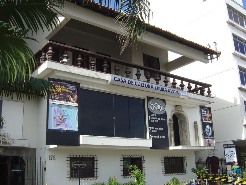 Vista da fachada do Estação SESC Laura Alvim